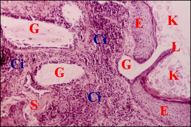 Pseudo-glandes dans le stroma inflammatoire d'un cholestéatome